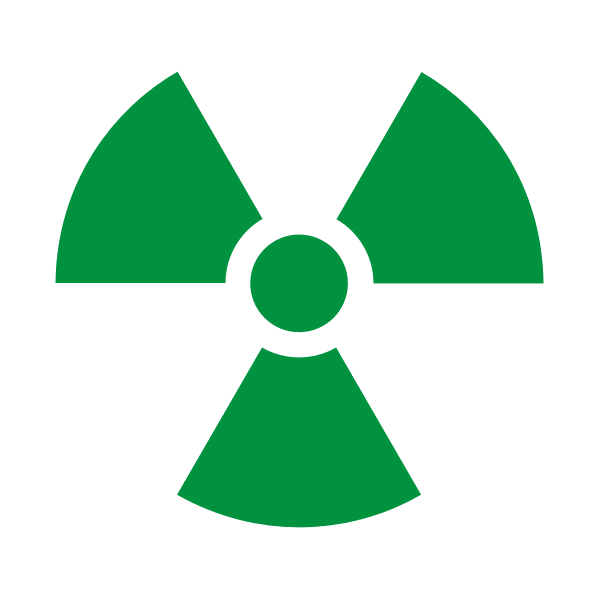 Símbolo de radiación. Zona controlada. Según legislación española (que transpone las directivas europeas, que a su vez recoge las recomendaciones internacionales) Apéndice 4: Señalización de zonas, Real Decreto 1753/1987, Apéndice 4: Señalización de zonas, punto 3, Real Decreto 53/1992 y la legislación vigente en España Anexo IV: Señalización de zonas, punto 5 Real Decreto 783/2001.